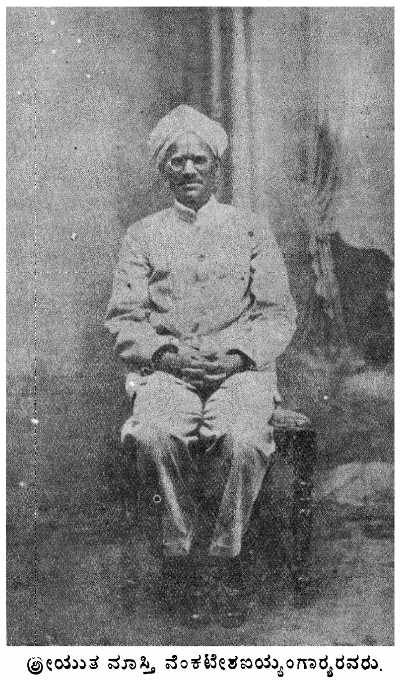 ಕನ್ನಡ: ತಮ್ಮ ಮಧ್ಯ ವಯಸ್ಸಿನಲ್ಲಿ ಮಾಸ್ತಿ ವೆಂಕಟೇಶ ಅಯ್ಯಂಗಾರರು